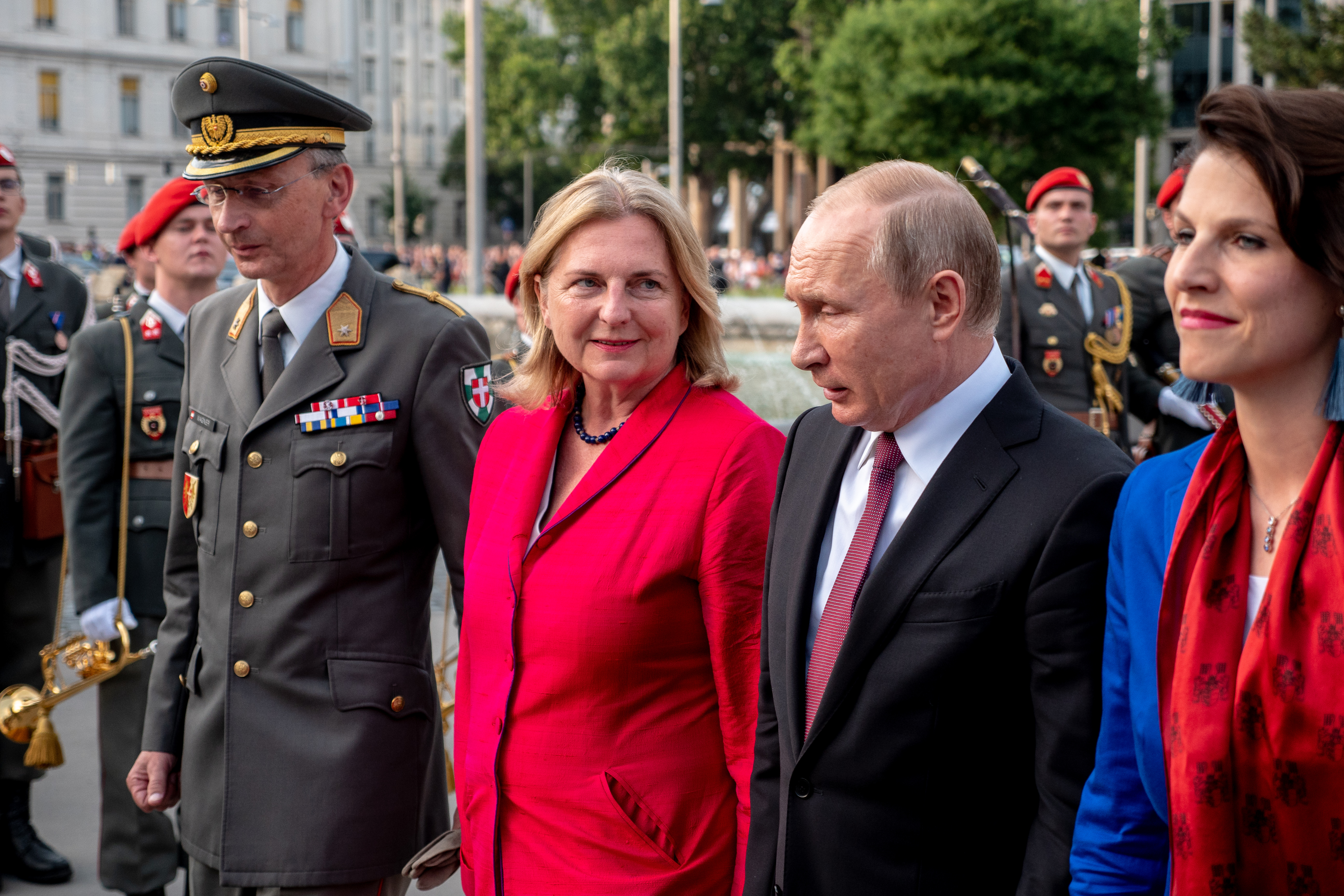 Präsident der russischen Föderation Putin besucht Österreich Foto Credit: BMEIA; Angelika Lauber